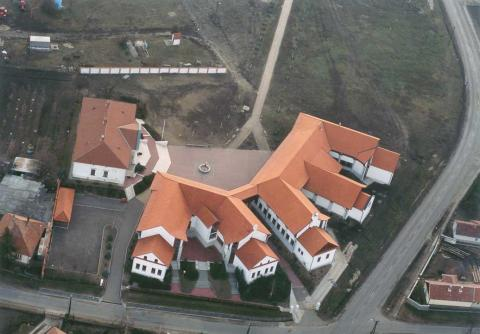 Tápiószele, Hungary, aerialphotgraphy